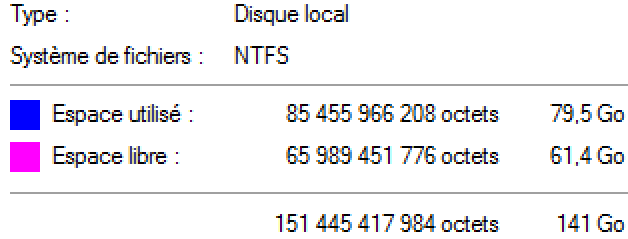 Erreur d'écriture d'unité de stockage avec Windows Vista.